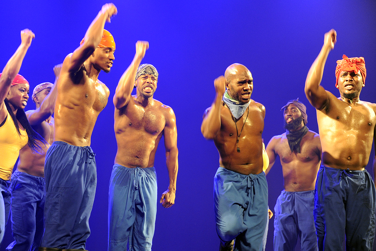 Step Afrika in Israel